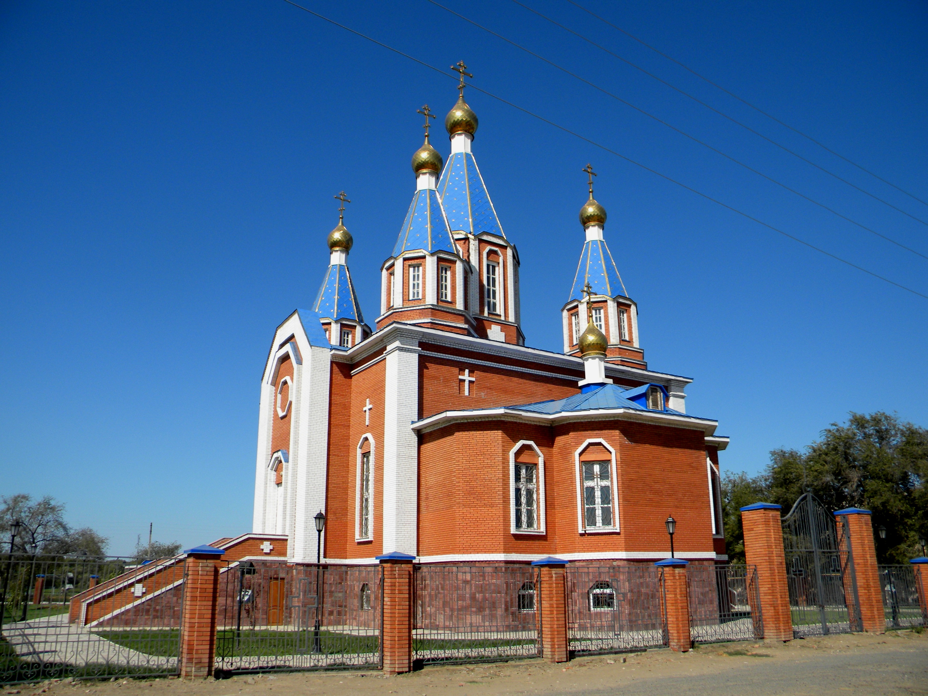 Церковь Смоленской иконы Божией Матери в городе Камызяк.